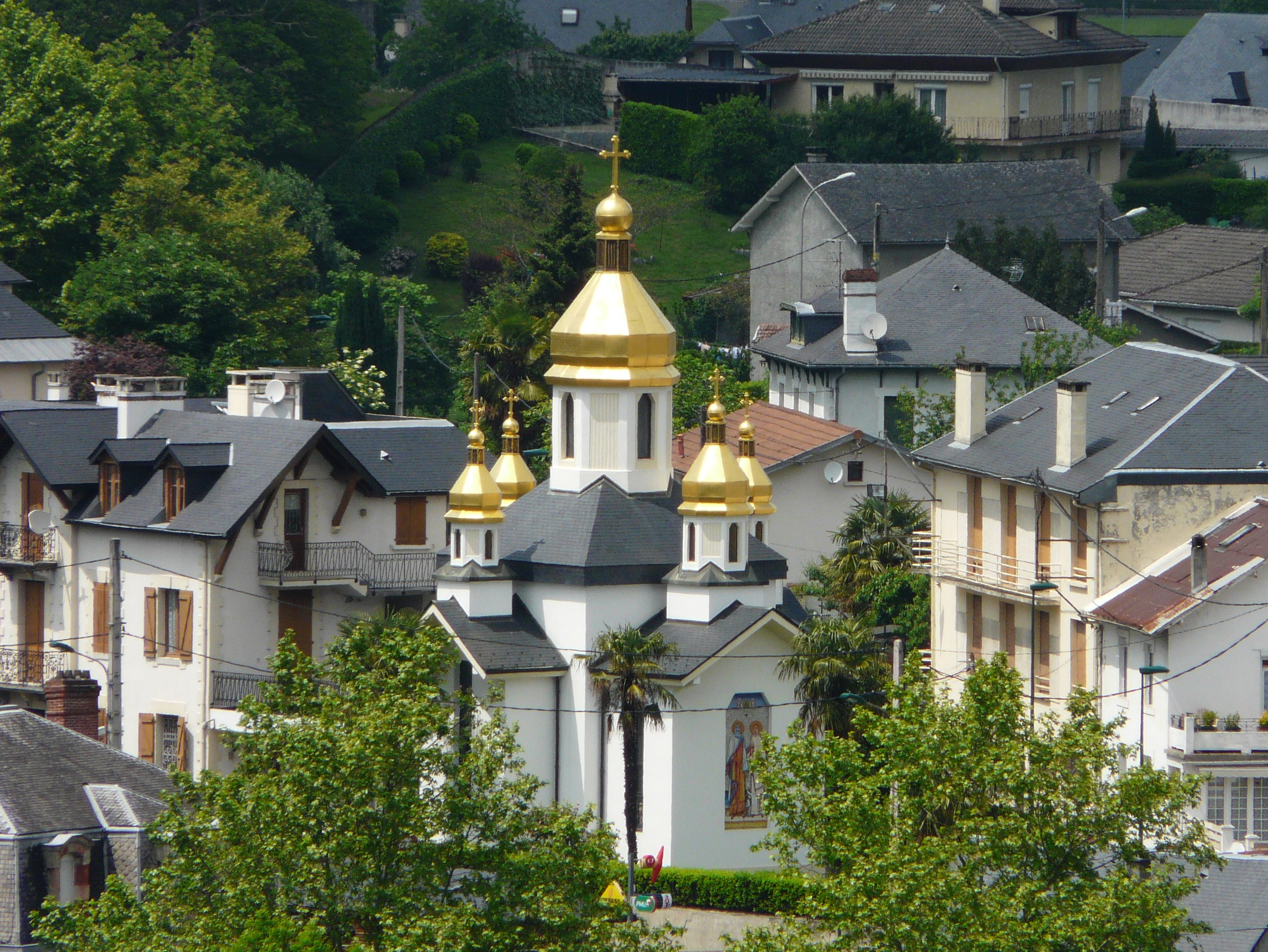 L'église orthodoxe de Lourdes vue depuis le château, Hautes-Pyrénées, France.